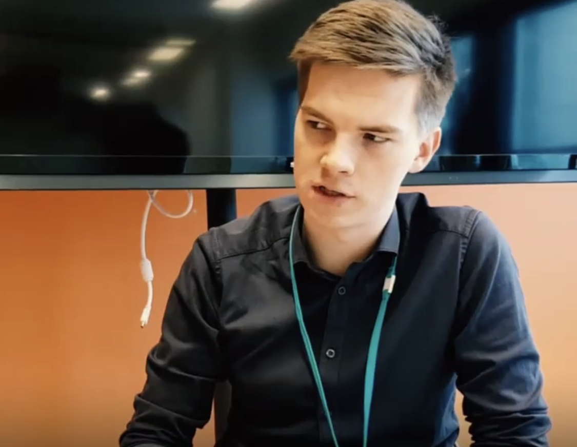 Toimittaja Matti Riitakorpi syyskuussa 2017.